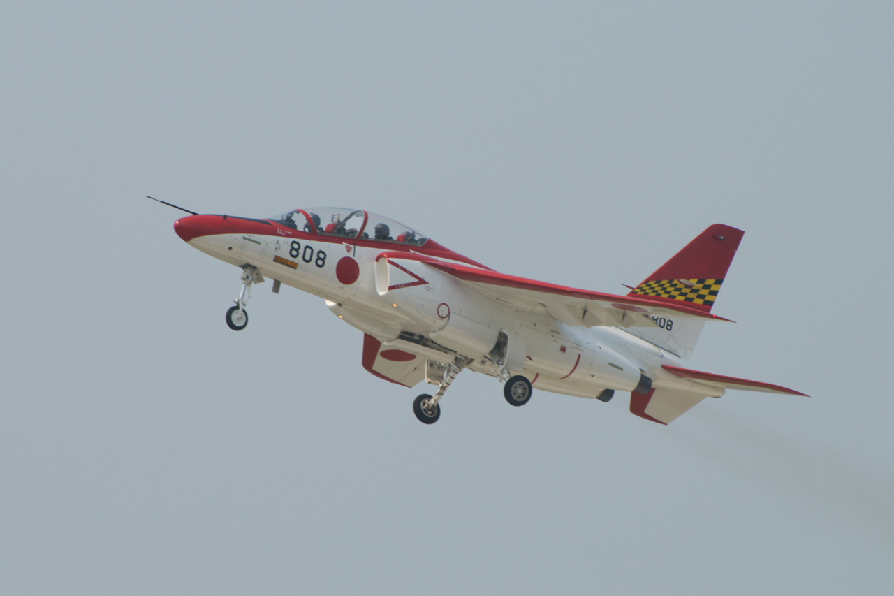 浜松の第32教育飛行隊(多分)の中等練習機T-4。ギアを出して着陸態勢。